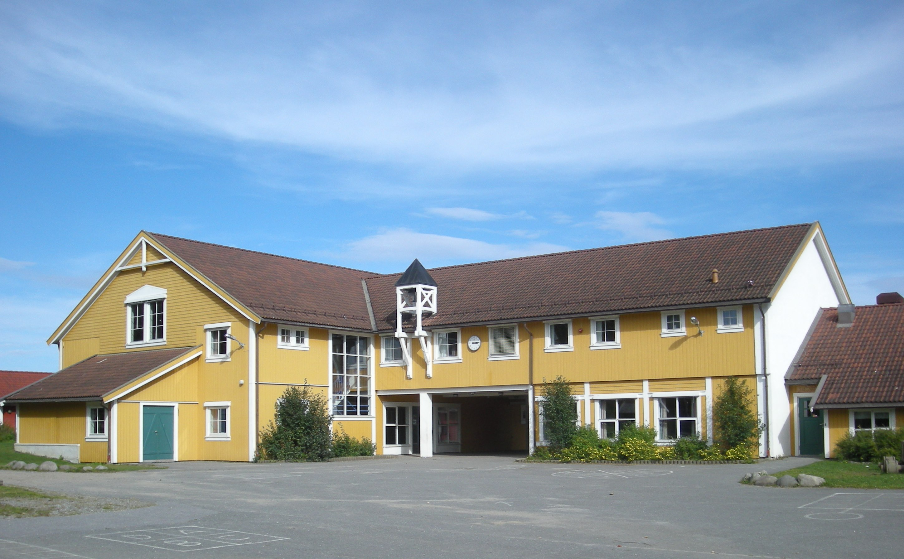 Ådalsbruk skole